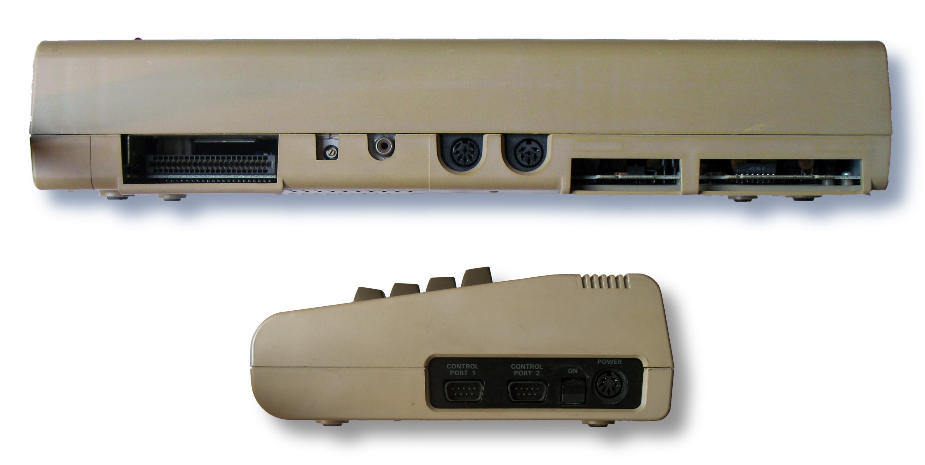 Schnittstellen des C64